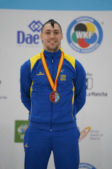 Україниський каратист